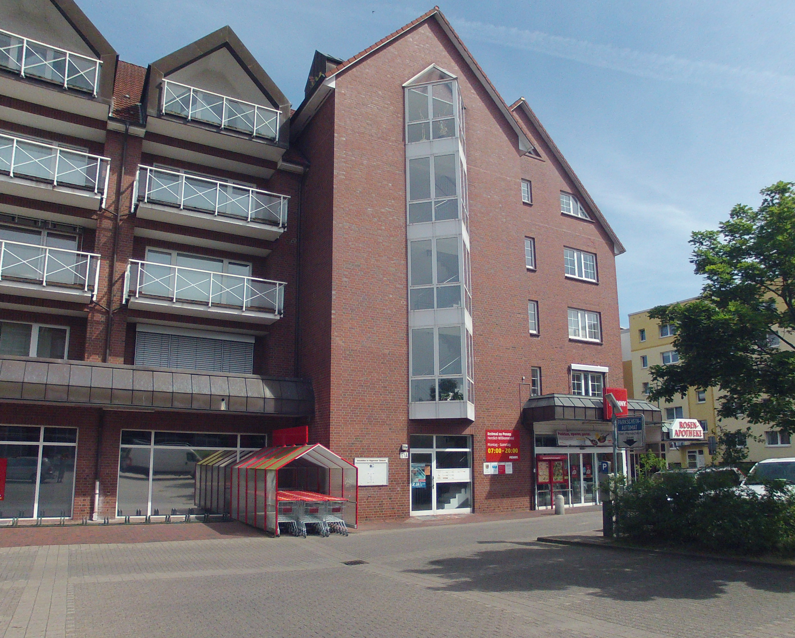 Gebäude des ehemaligen Amtsgerichts Hagenow in der Möllner Straße